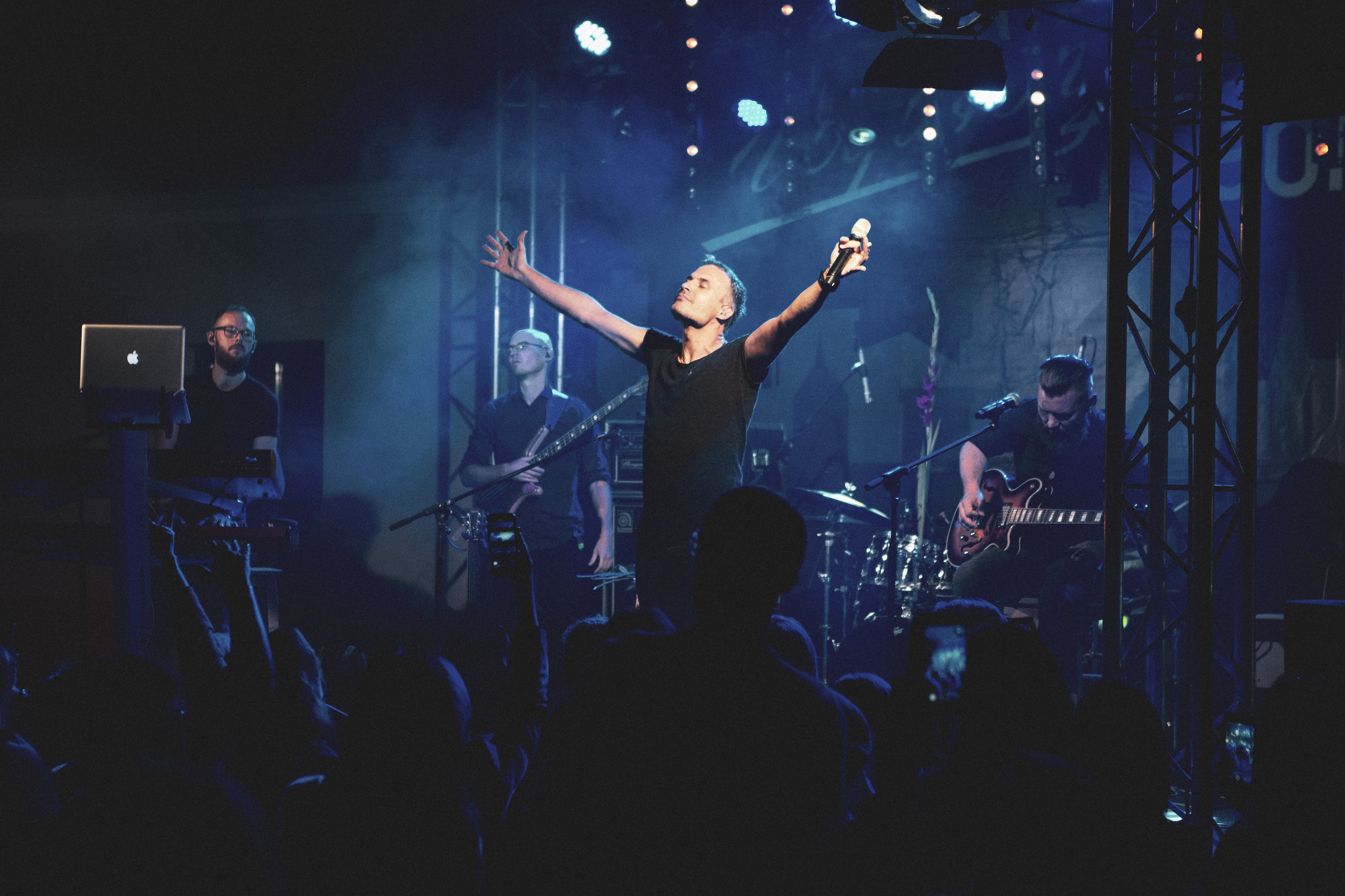 Mantas Jankavičius. Akimirka iš koncerto, 2019 m.